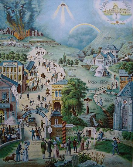 Eine Version des Bilds "Der breite und der schmale Weg" nach Charlotte Reihlen (Idee)/Paul Beckmann (Ausführung)